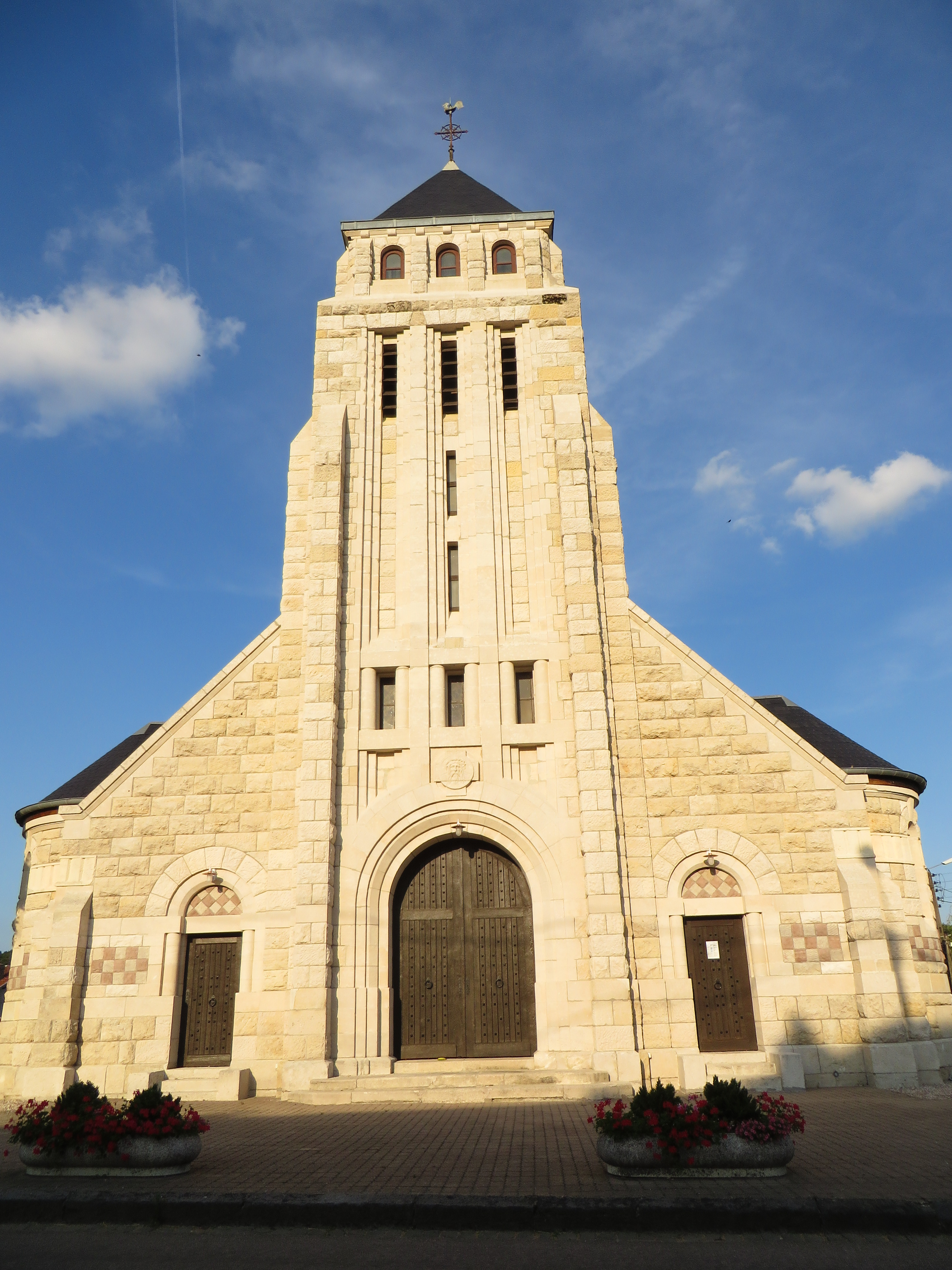 Romagne-sous-Montfaucon L'église Saint-Michel